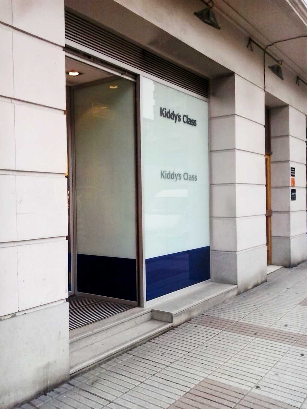 Imaxe de Kiddys Class na Coruña.